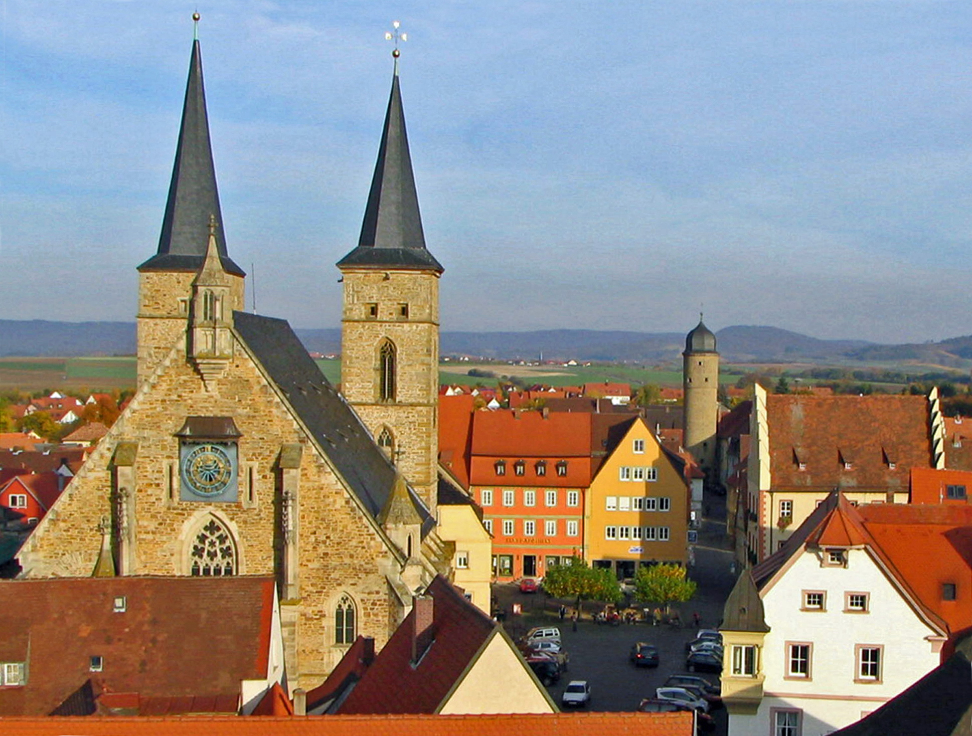 Der Marktplatz, Ort des Frauenaufstands vom 6. April 1945